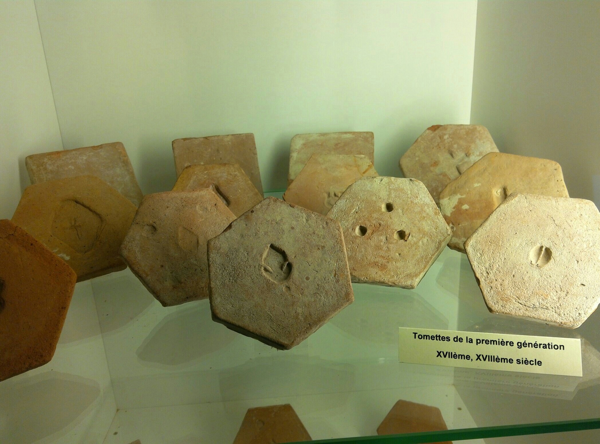 Historische Tomettesammlungim Museum in Salernes (Terrarossa Museum :fr:|Collection de Tomette à Salernes